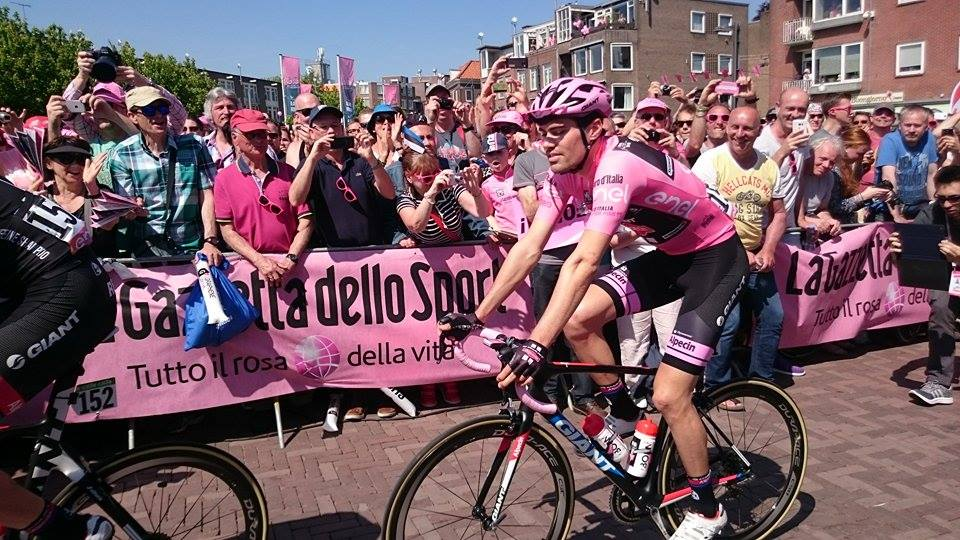 Tom Dumoulin